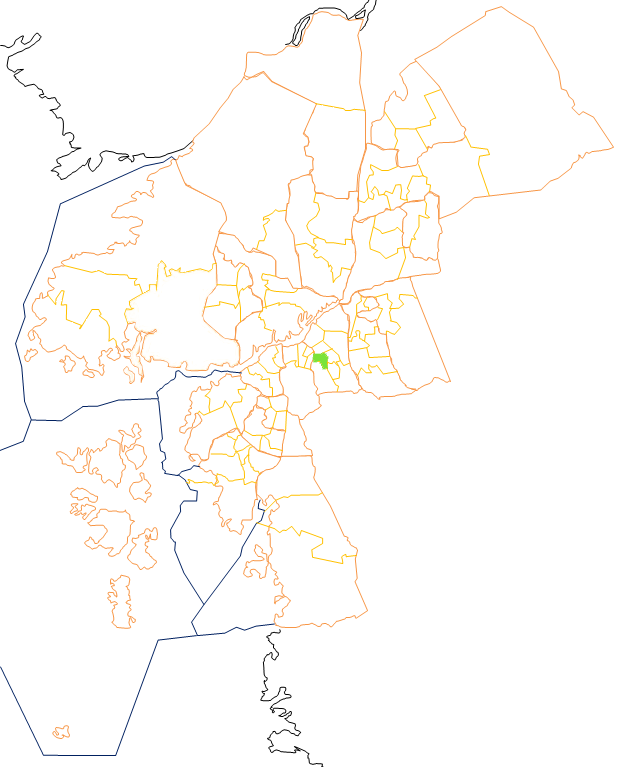 Karta som visar primärområdes belägenhet i Göteborg